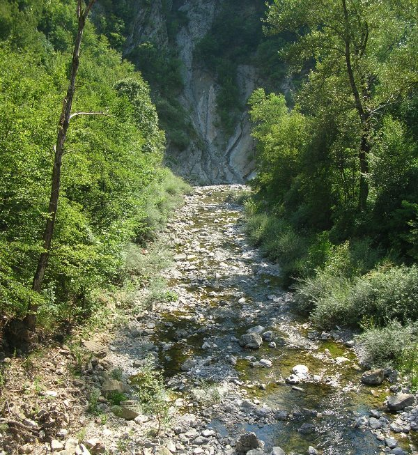 Foto propria Agosto 2008 Valbrevenna (Genova) - Torrente Brevenna